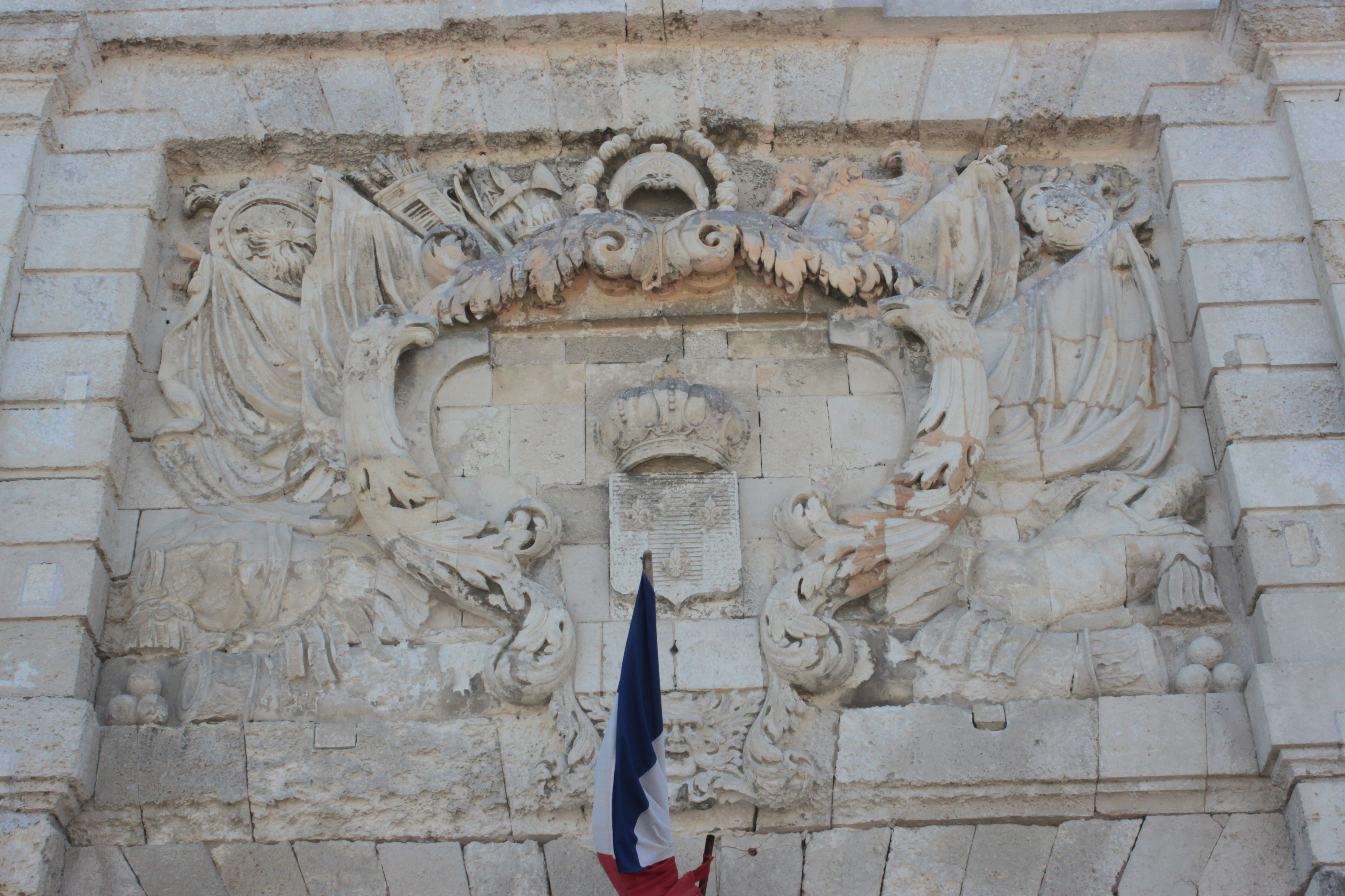 Fronton de la porte de la citadelle, Fr-17-Saint-Martin-de-Ré.